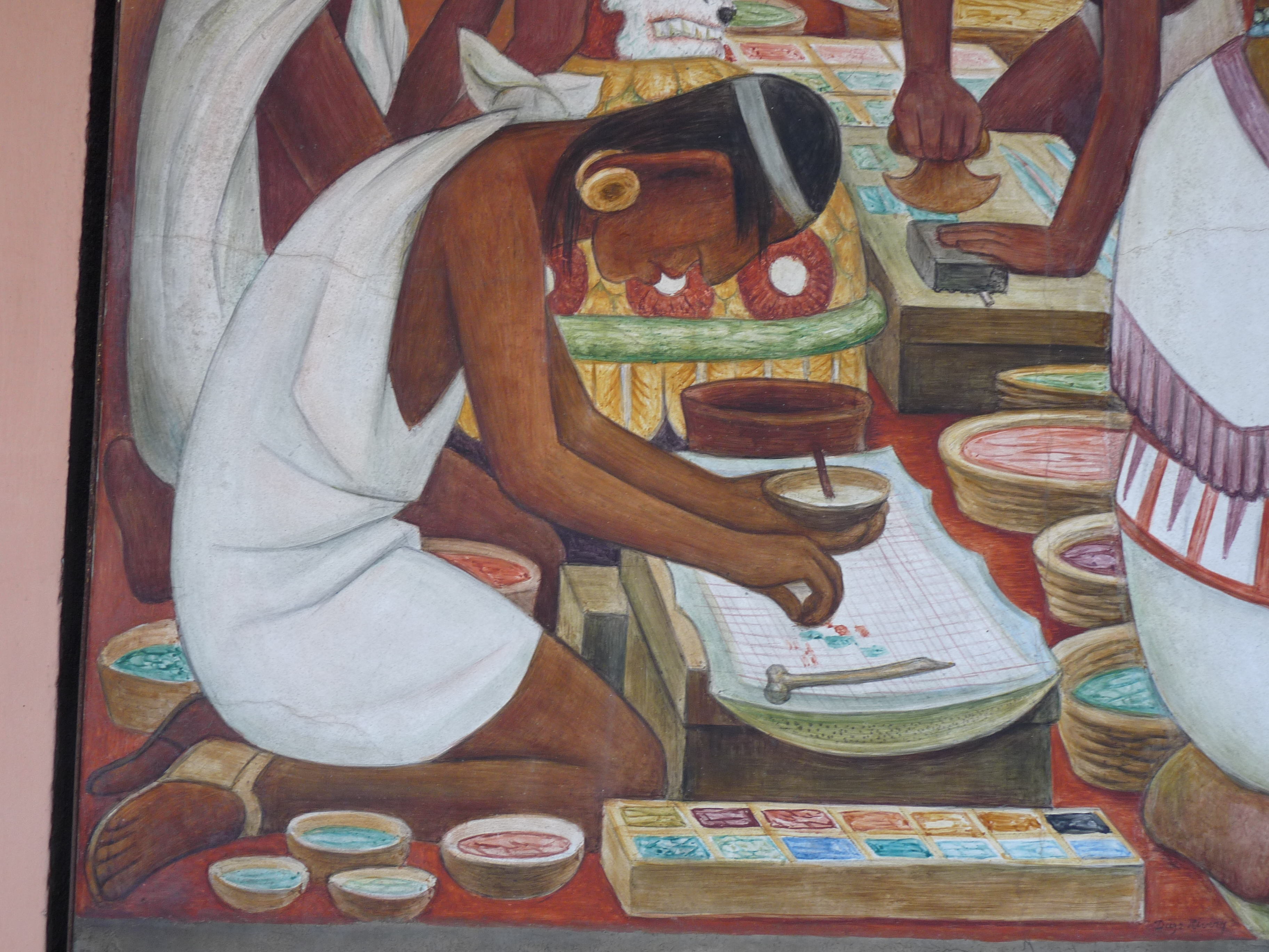 Tlacuilo mesoamericano